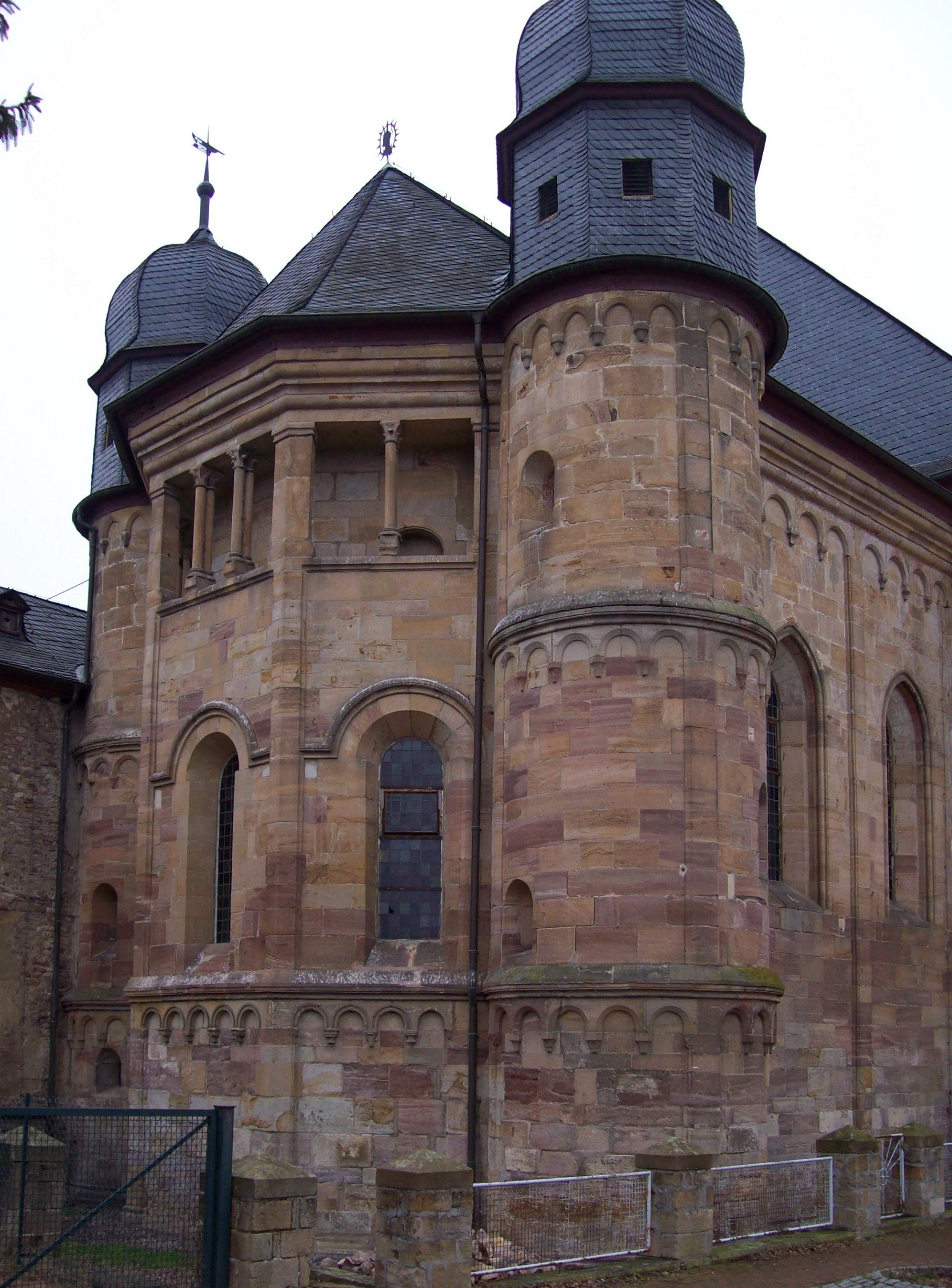 Ehemaliges Augustiner-Chorherrenstift Pfaffen-Schwabenheim, Rheinland Pfalz, heute Pfarrkirche Maria Himmelfahrt. Frühgotischer Chor von etwa 1240